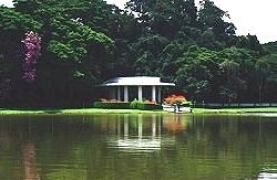 Fonte Vichy - São Lourenço - MG - Brasil